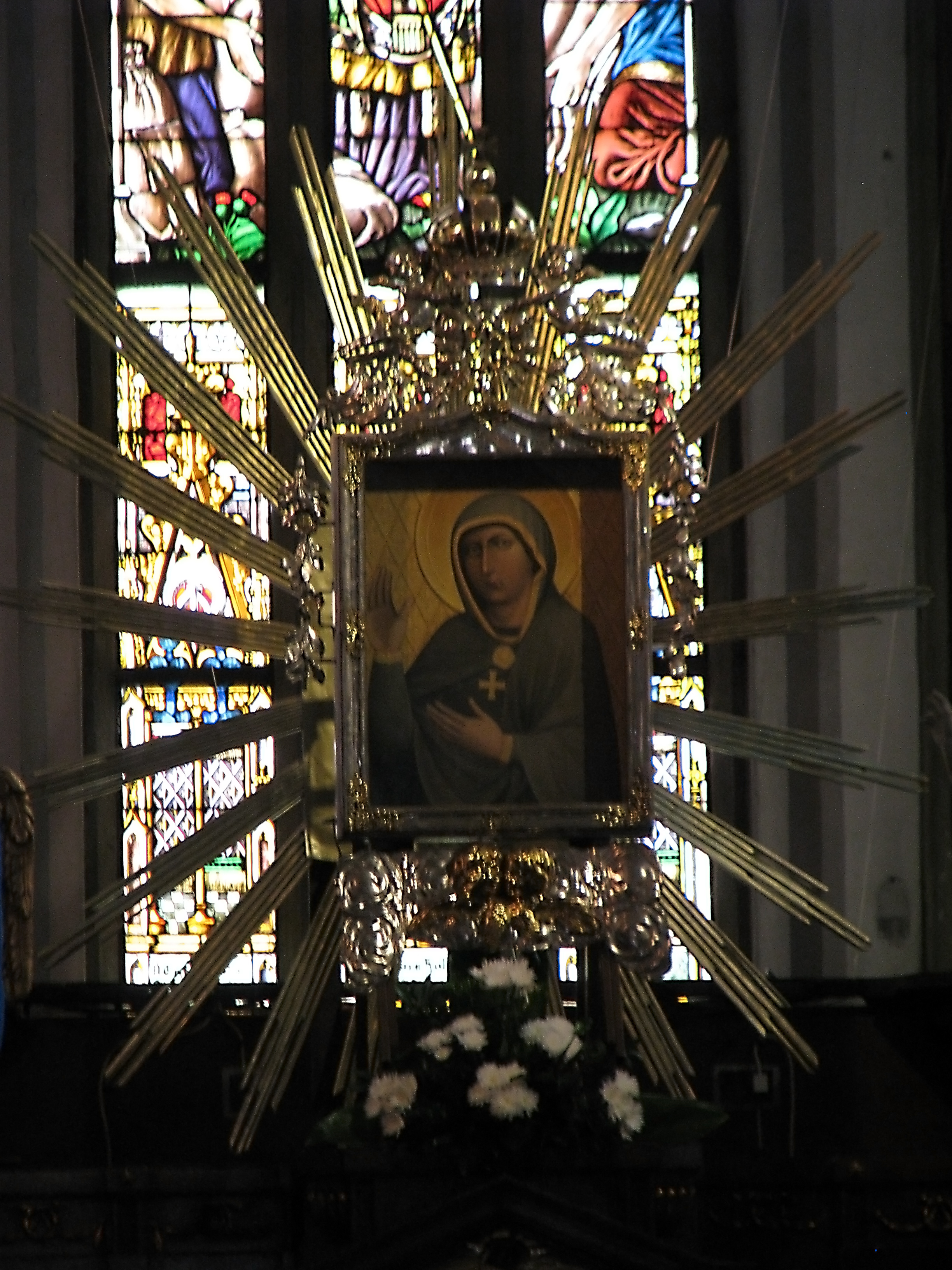 Altarbild des Nikolaus-Doms in Tyrnau